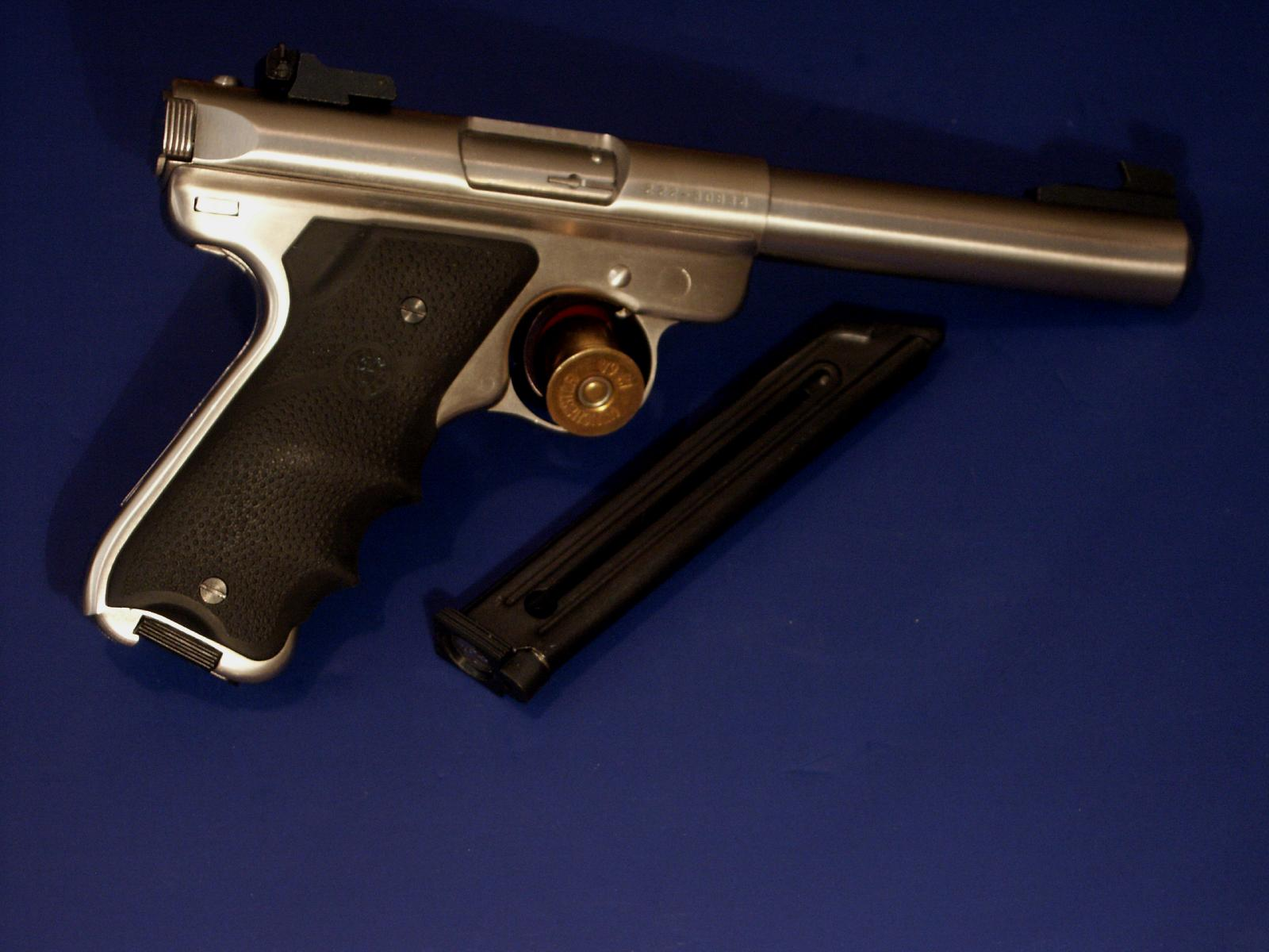 Ruger KMK512, MKII .22 LR